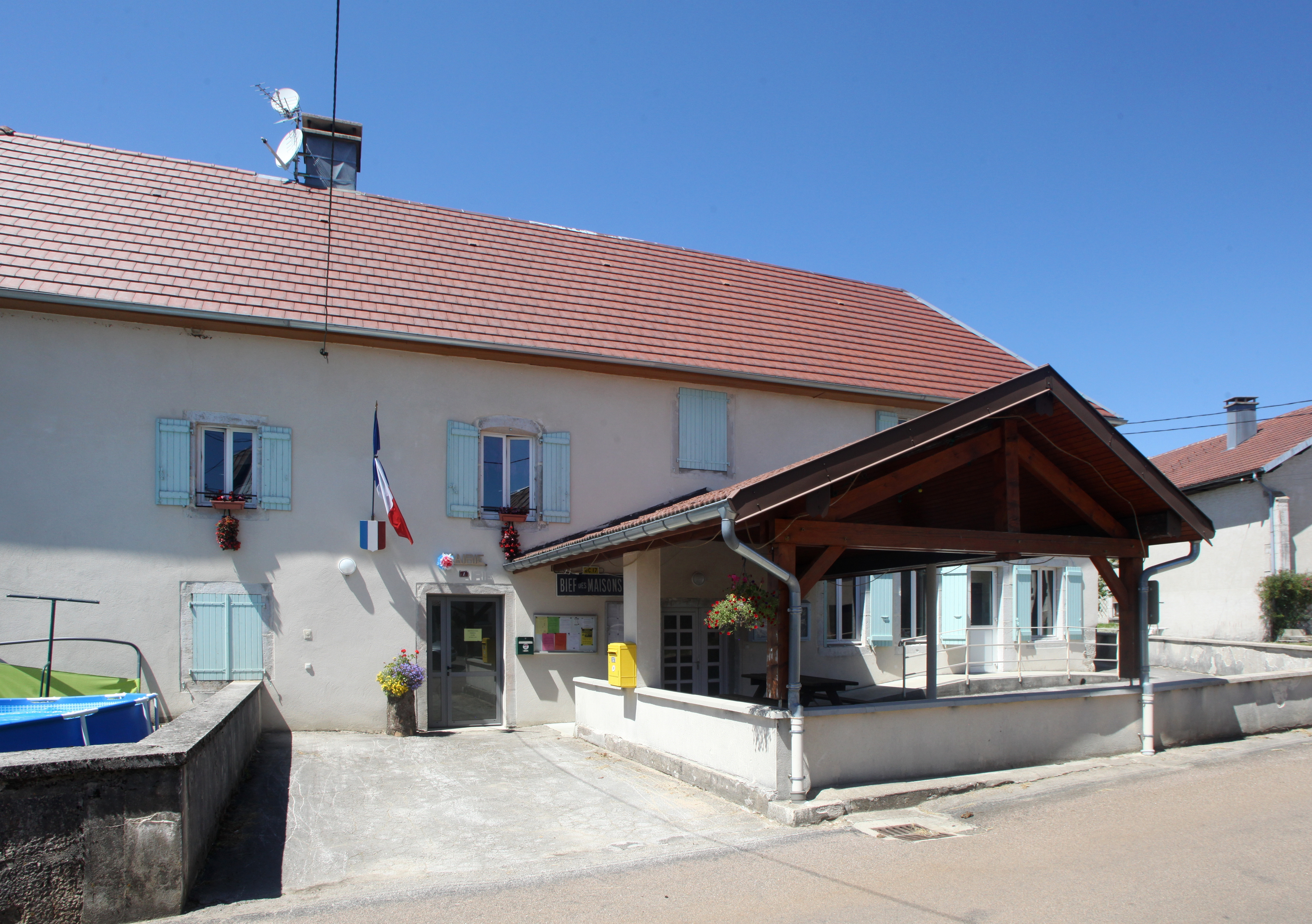 Mairie de Bief-des-Maisons (Jura).